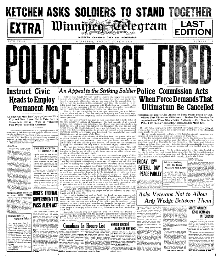 Winnipeg Telegram Front Cover June 9 1919